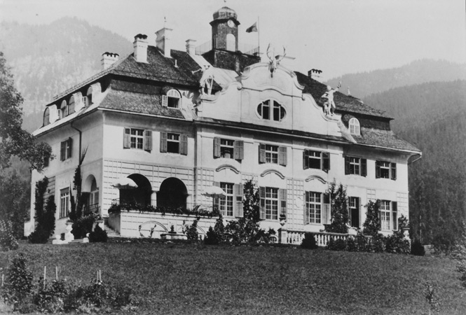 Schloss Gosau, Österreich